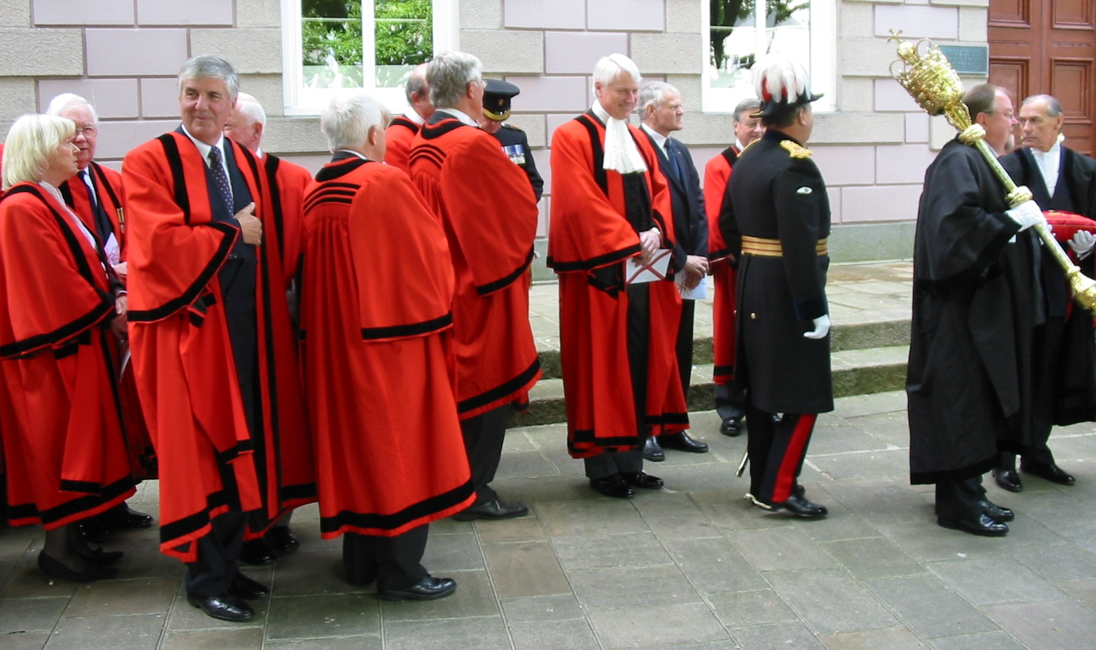 Nrf: Jour d'la Libéthâtion, Jèrri, 9 d'Mai 2009